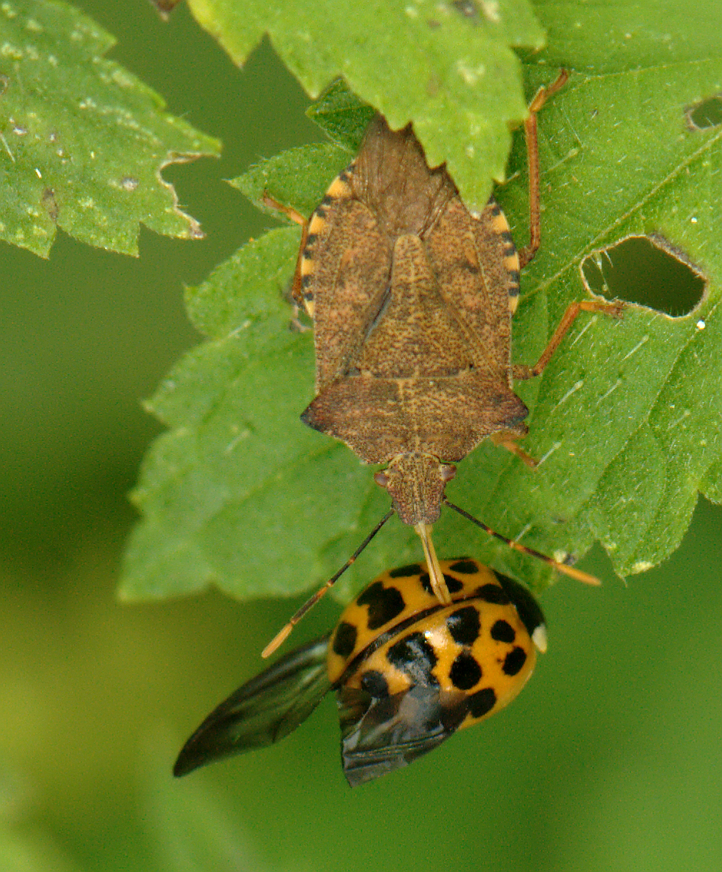 Arma custos (Pentatomidae) mit erbeutetem Asiatischen Marienkäfer (Harmonia axyridis). Bucher Forst, Berlin-Pankow